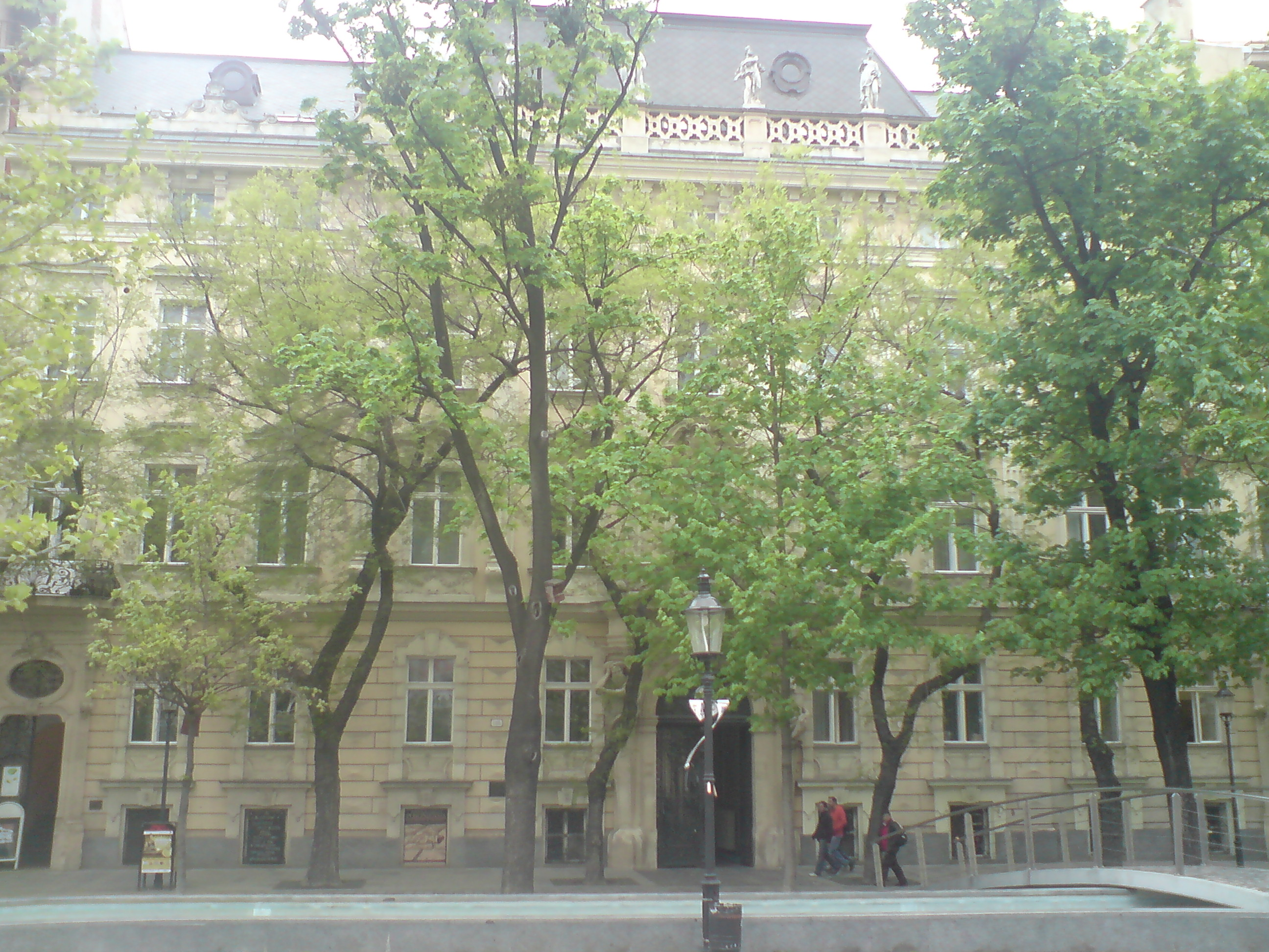 Pálffyho palác, Hviezdoslavovo námestie, Bratislava